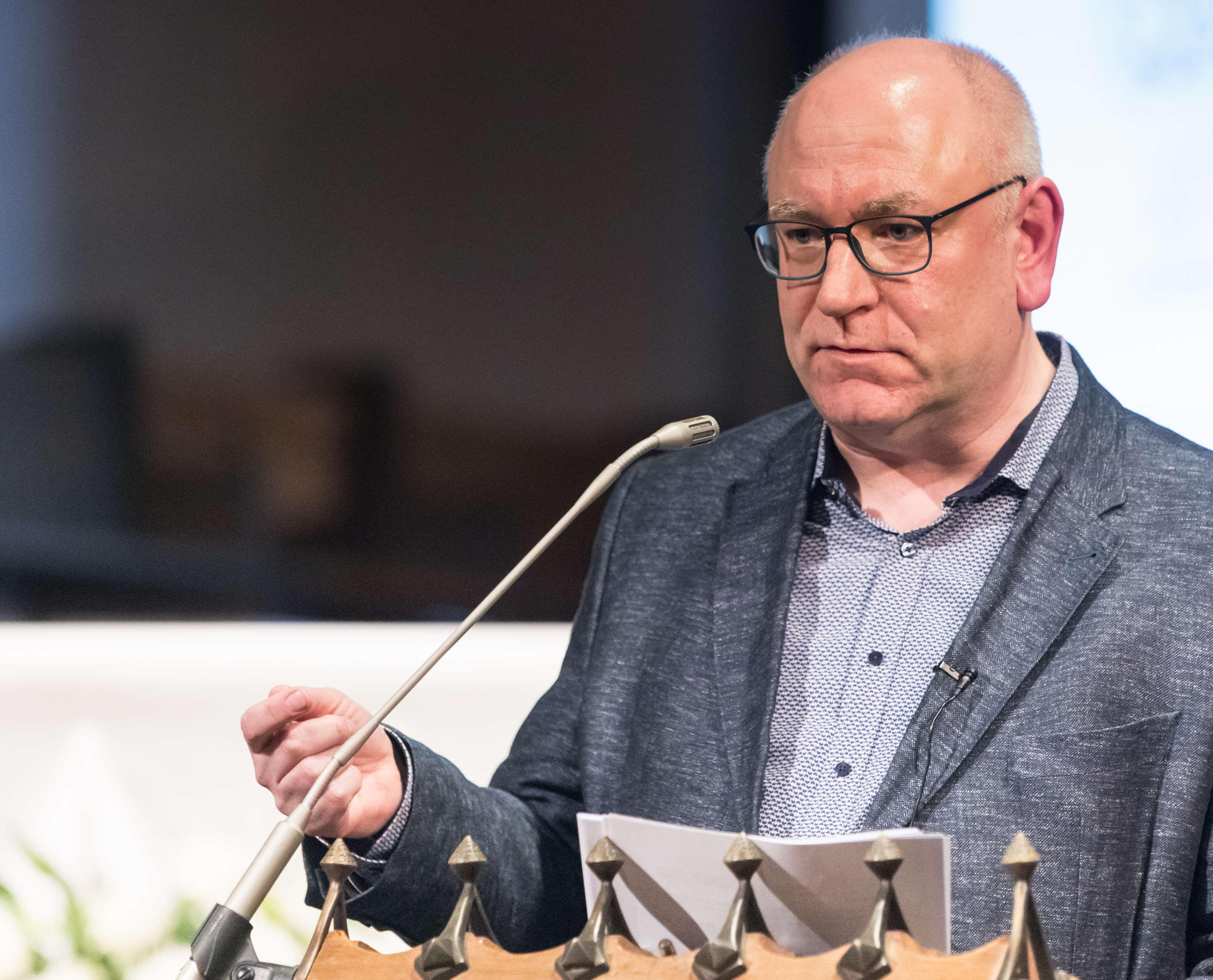 Anlässlich des 500. Geburtstags des Kölner Ratshern und Chronisten Hermann Weinsberg fand eine kommentierte Lesung aus Weinsbergs Aufzeichnungen statt – in der Kirche St. Georg am Waidmarkt als einem Originalschauplatz unweit von Weinsbergs Wohnhaus. Die Beiträge wurden von zwei Dolmetschenden abwechselnd in Gebärdensprache übersetzt. Lesung und Kommentare: Mario Kramp, Joachim Oepen. Begrüßung und Einleitung: Historiker Stefan Lewejohann, Pfarrer und Hausherr Hermann-Josef Reuther. Hier: Joachim Oepen